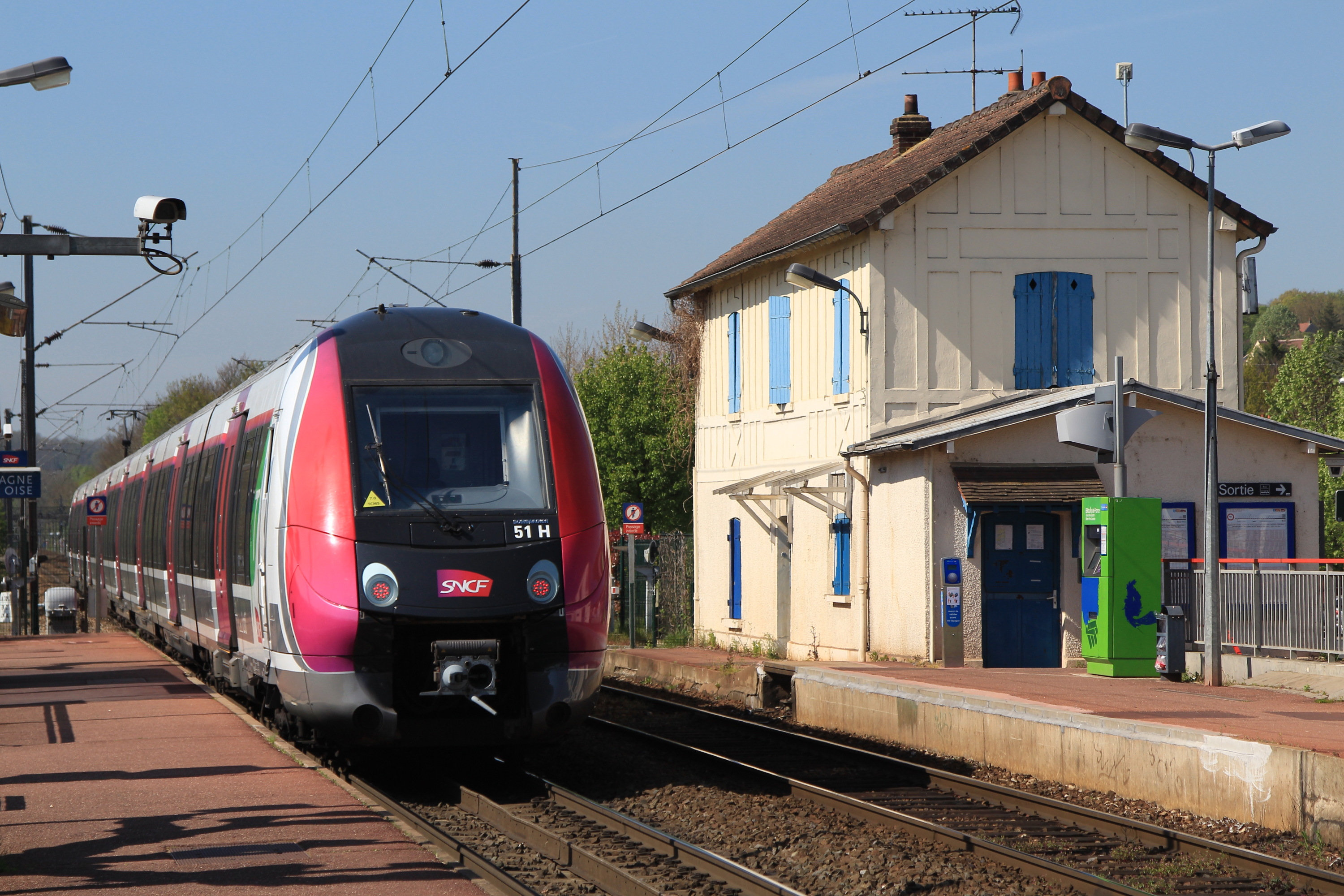 Un train Persan-Beaumont - Paris-Nord assuré par une Z 50000 repart de la gare de Champagne-sur-Oise.